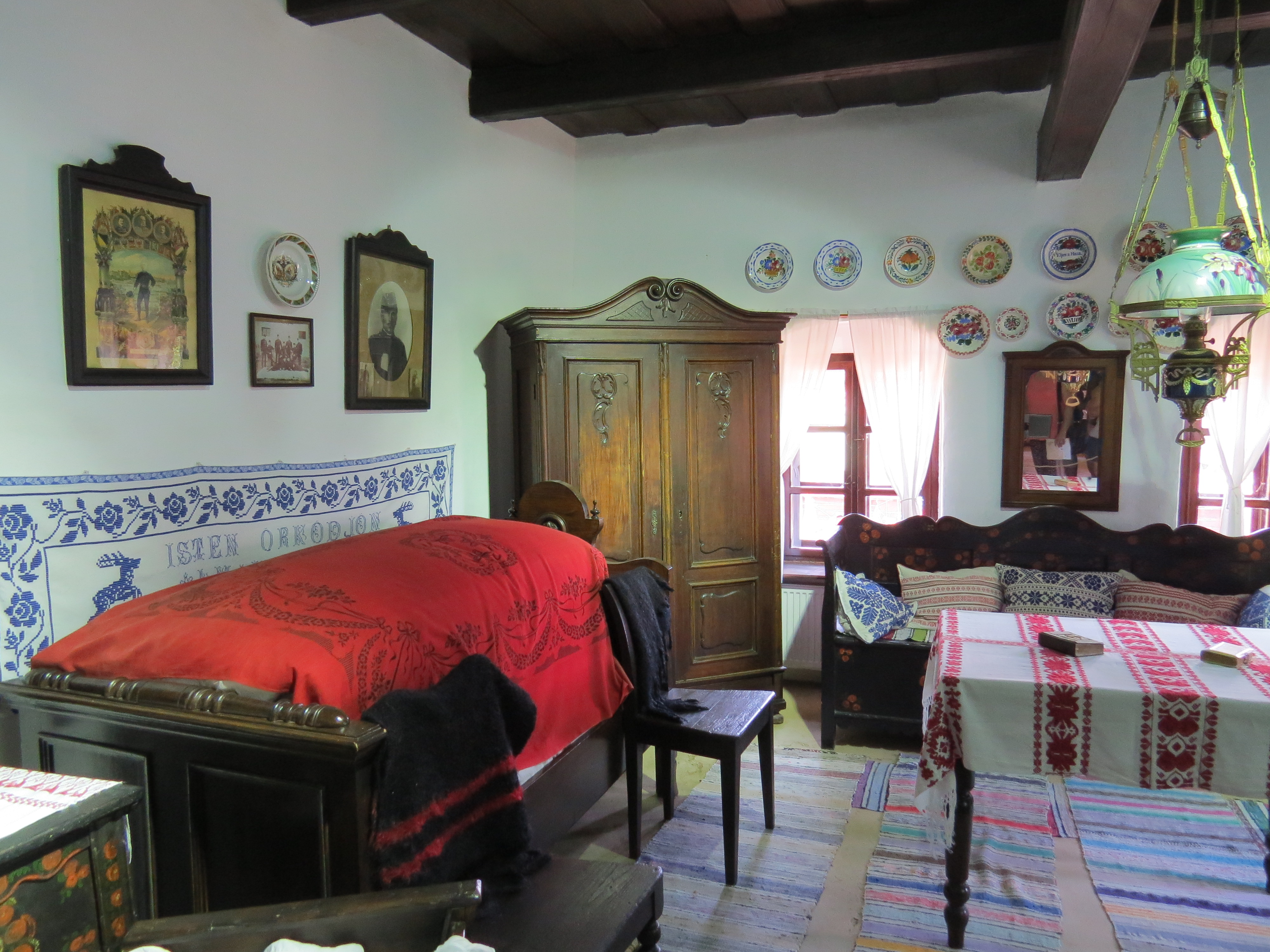 A Bodrogközi Múzeumporta "alapító" tájházának szoba részlete.